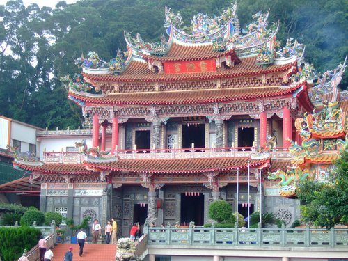 仙山--靈洞宮